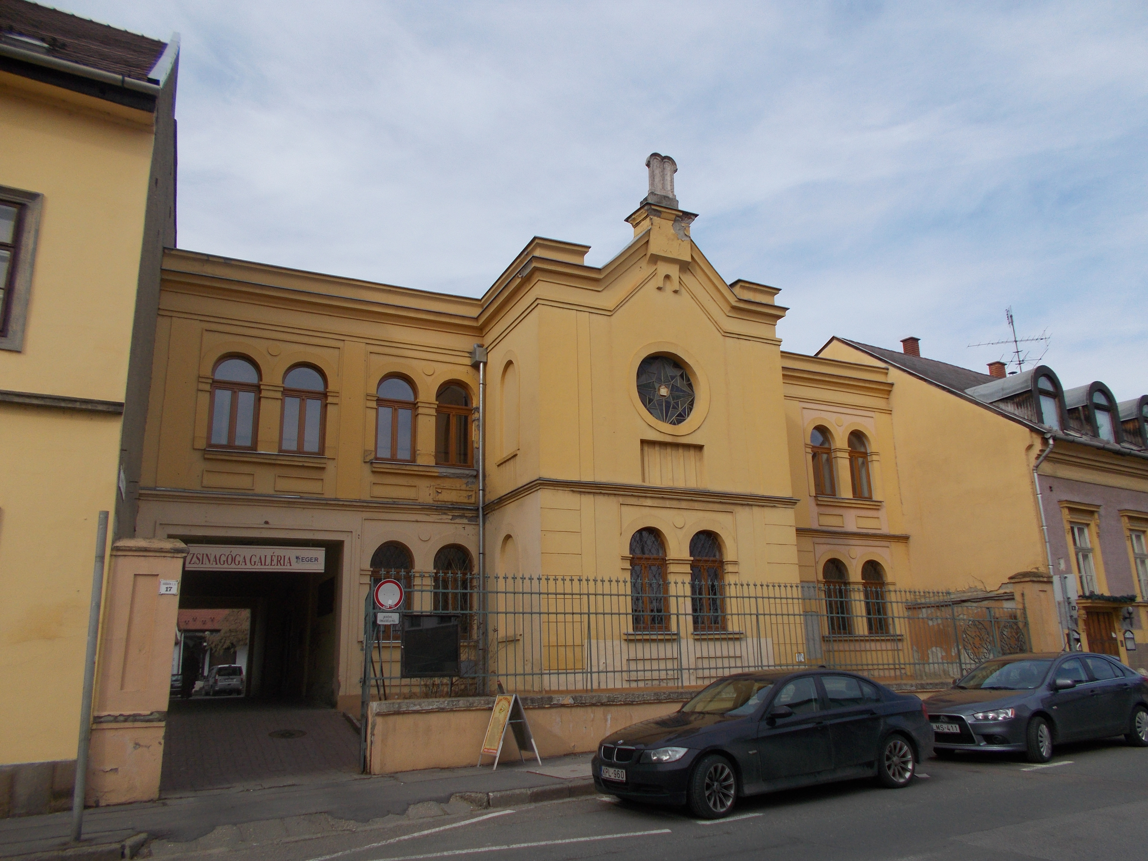 Zsinagóga Galéria, Eger